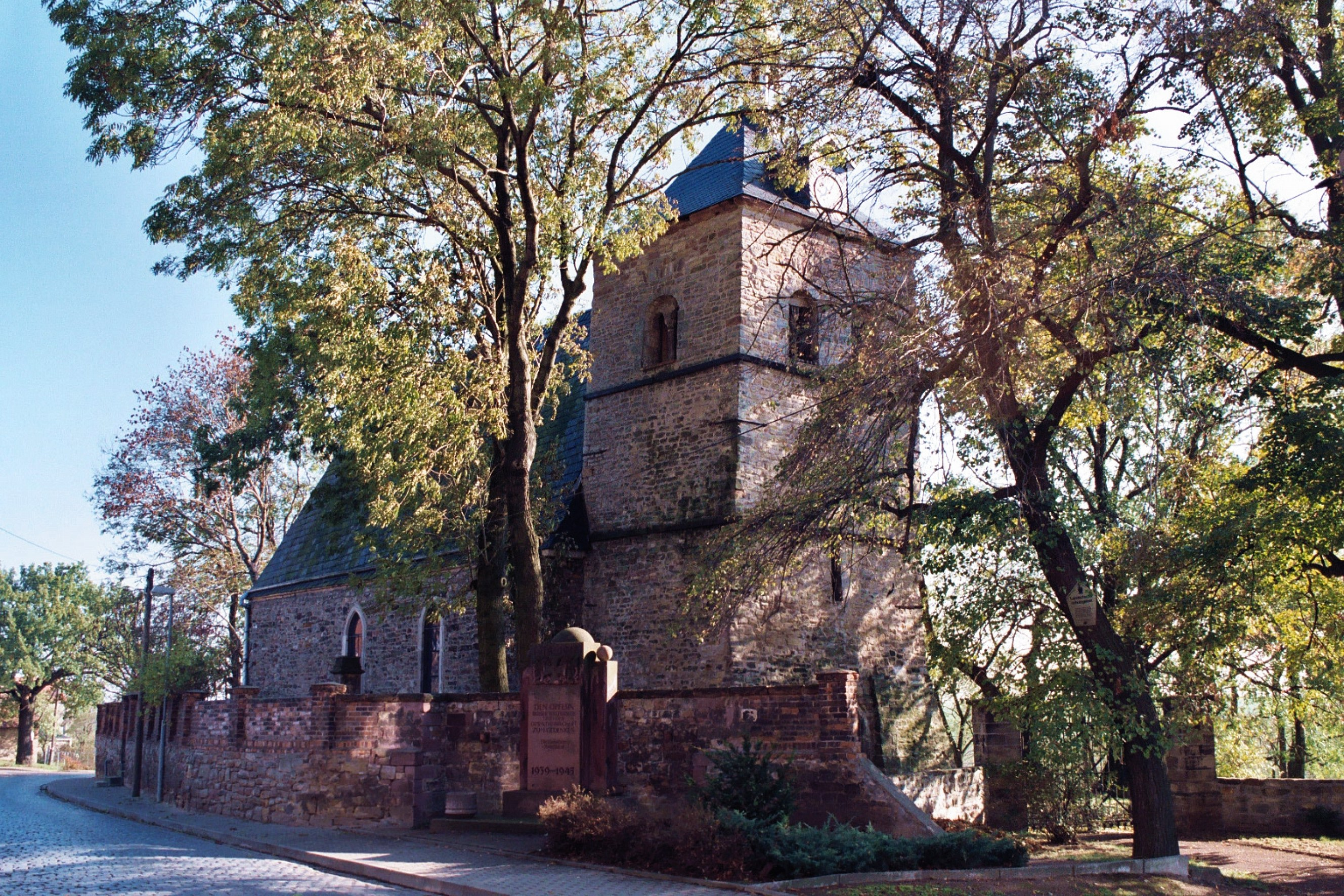 Die Dorfkirche Oberrißdorf This is a photograph of an architectural monument. 65478